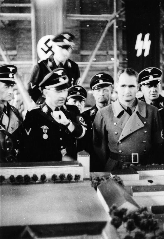 Dachau, Konzentrationslager, Besuch Himmlers Schutzhaftlager Dachau.- Himmler und Hess bei der SS in Dachau. Besichtigung eines Lager-Modells. Abgebildete Personen: Himmler, Heinrich: Reichsführer der SS, Deutschland (PND 11855123X) Heß, Rudolf: Stellvertreter Hitlers als Führer der NSDAP, Kanzleileiter, Deutschland (PND 11855039X)